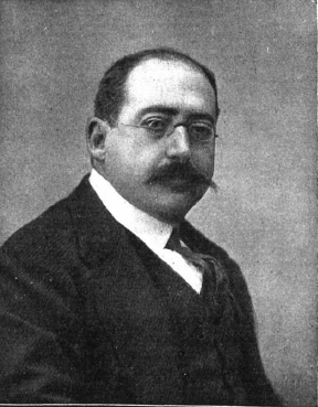 Fotografía del periodista, gastrónomo y político español Dionisio Pérez